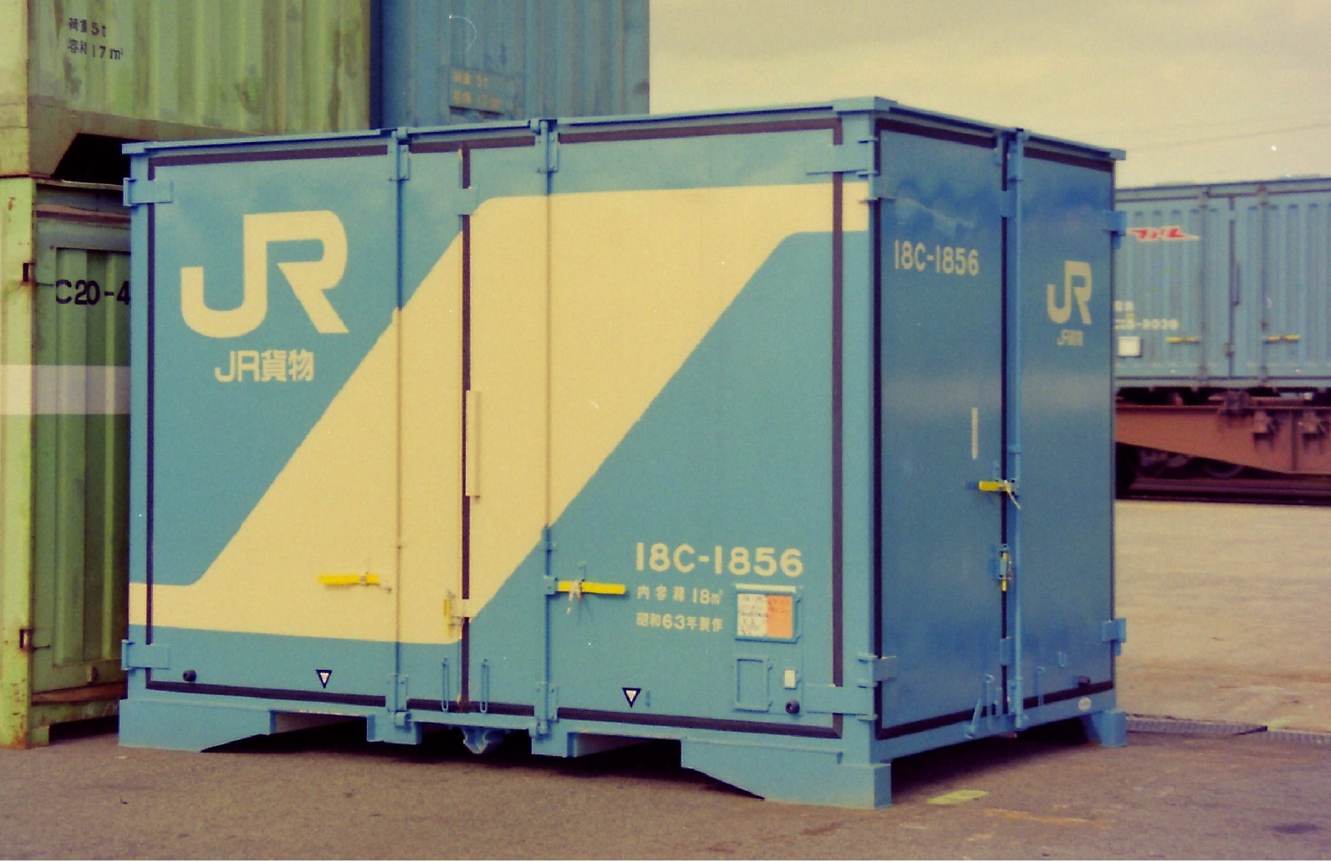 撮影地＝【大阪／旧、百済貨物駅】